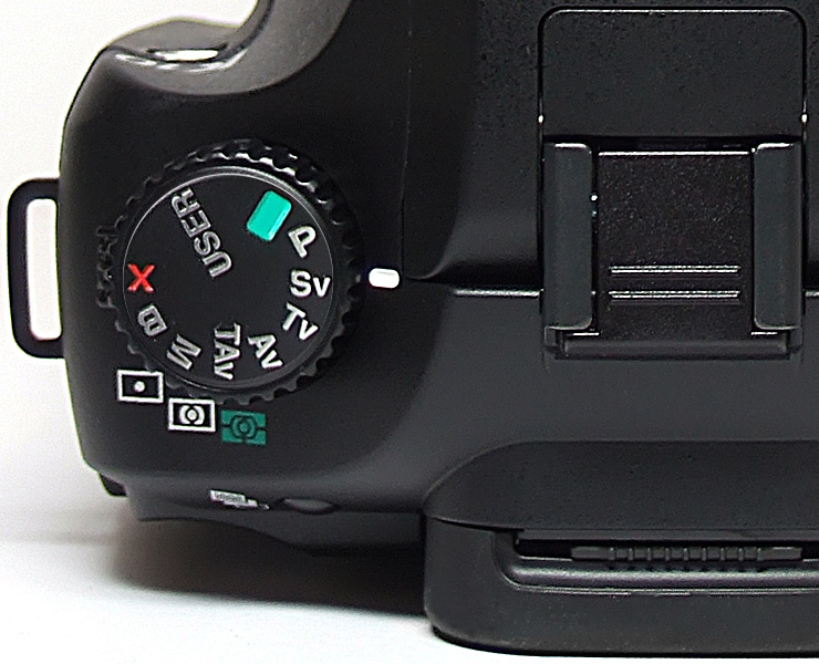 Селектор режимов в положении Sv на фотоаппарате Pentax K10D